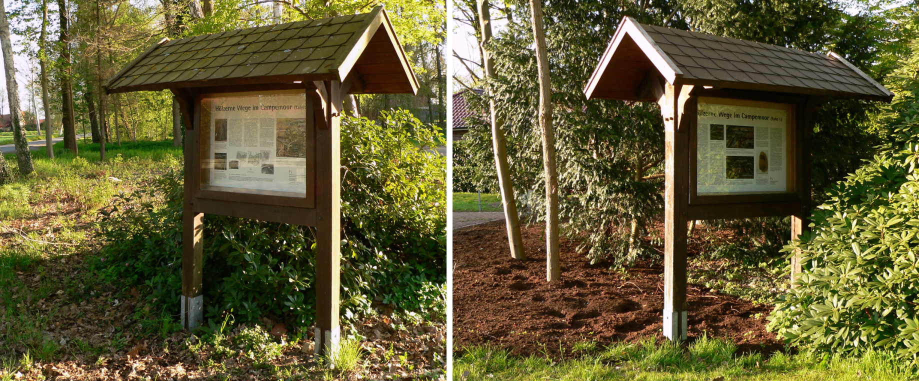 Infotafeln zu den vorgeschichtlichen Wegen im Campemoor, aufgestellt an zentraler Stelle im Ortsteil Campemoor am Vereinshaus